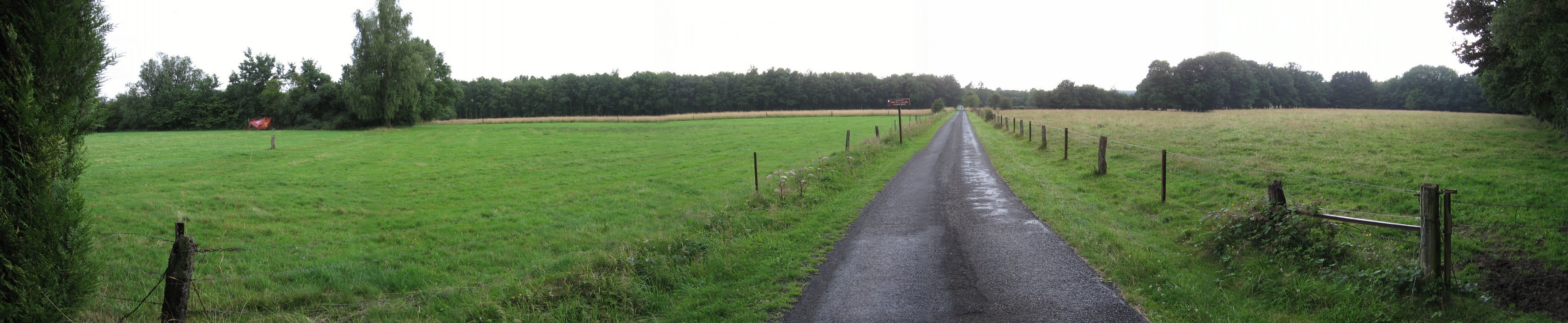 Panorama à partir de la Stèle de la Bataille de Rocroi. A gauche c'est le territoire de Rocroi et à droite celui de Sévigny-la-Forêt.